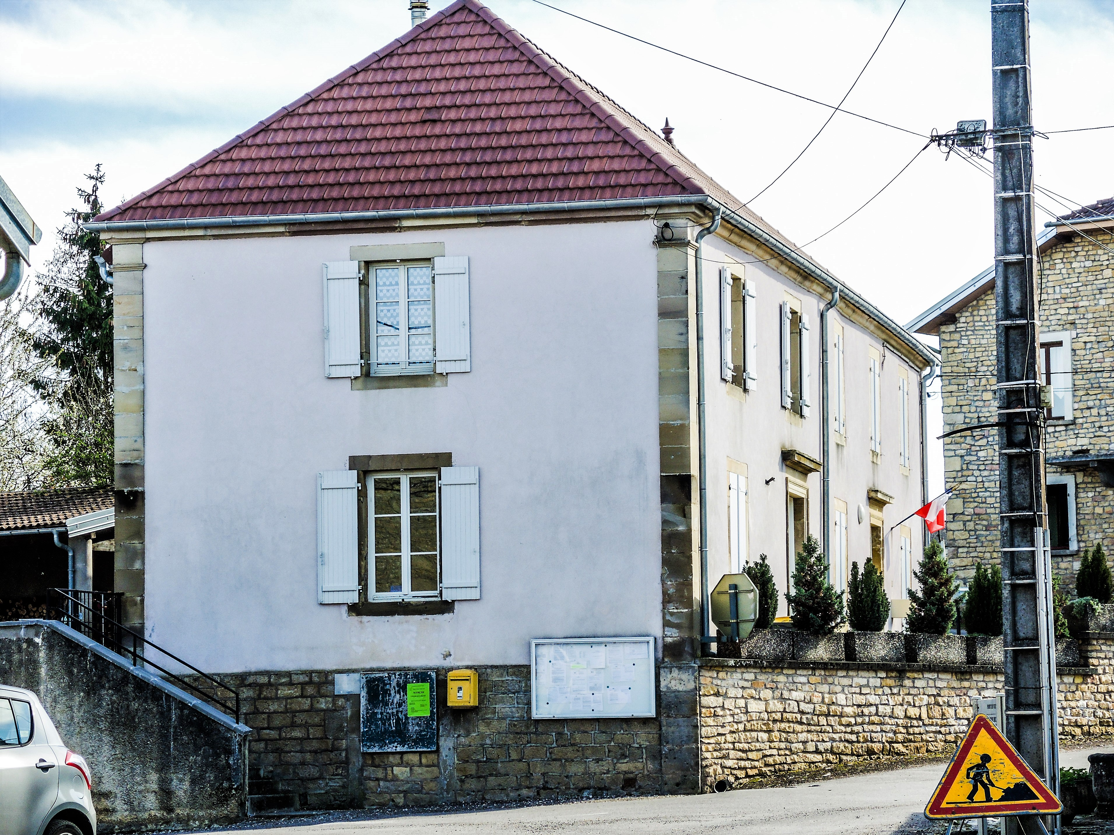 Mairie